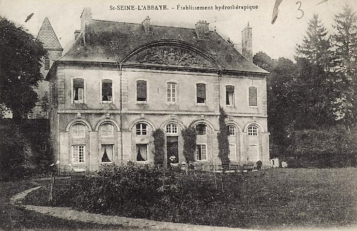 Saint-Seine-l'Abbaye, établissement hydrothérapique, Lejolivet Charles-Joseph (architecte de la ville)